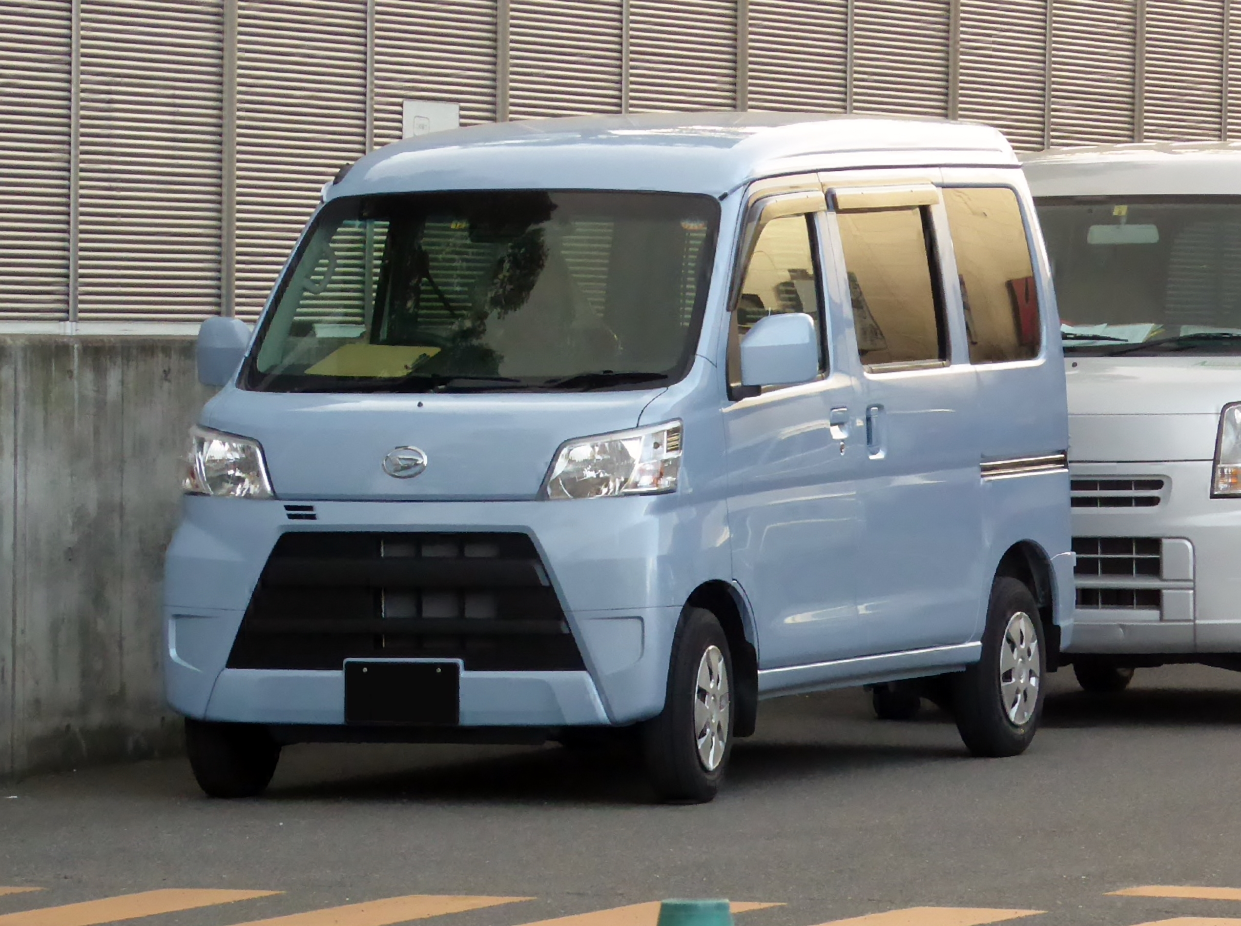 EBD-S321V-ZQGZ型ダイハツ・ハイゼットカーゴクルーズターボ"SA III"を撮影。